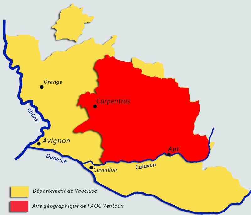 Carte de l'aire géographique du Ventoux AOC